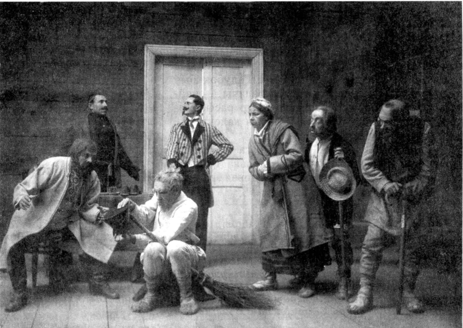 Беларуская (тарашкевіца): Сцэна з спэктаклю «Суд» Трупы беларускіх артыстаў. 1920-я гг.